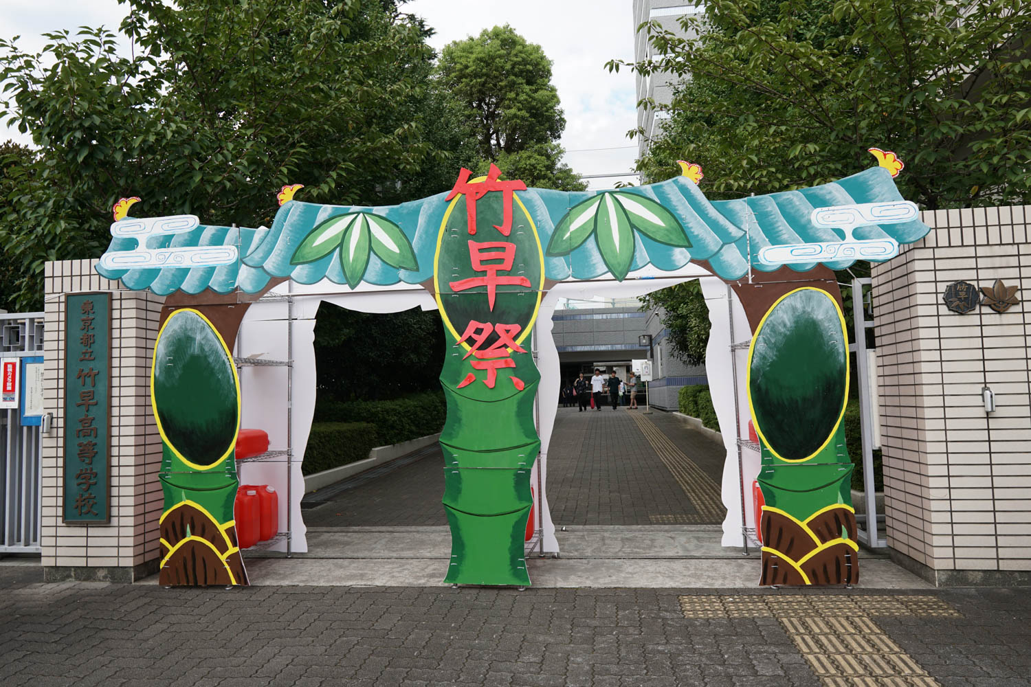 2019年の竹早祭